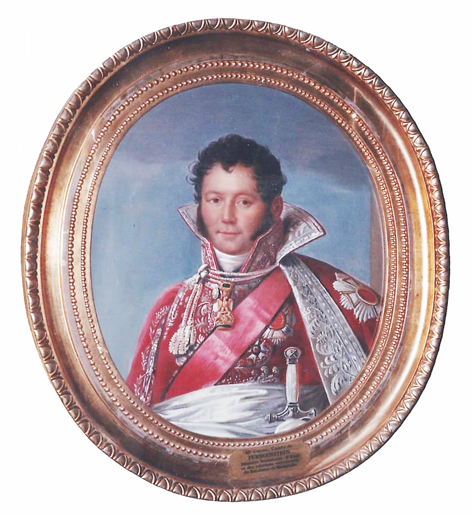 Portrait von Mr Camus, Comte de Fürstenstein, Ministre Secrétaire d'Etat et des relations exterieures du Royaume de Westphalie